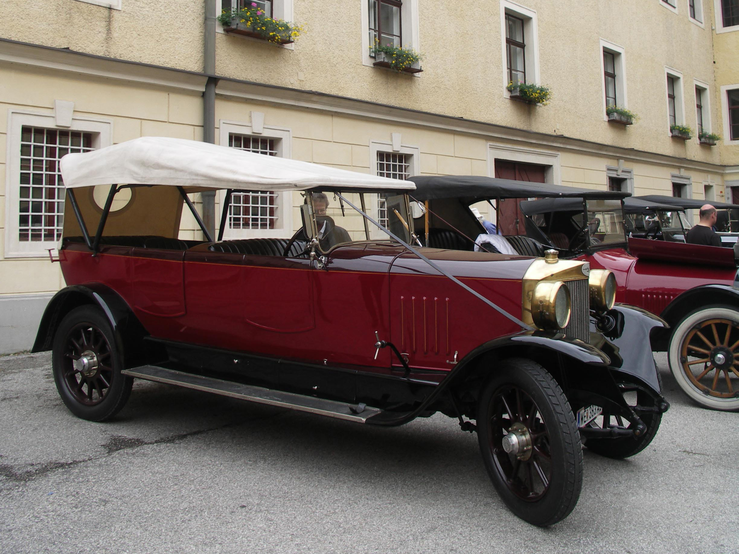 Steyr Tourenwagen Typ VII 1926